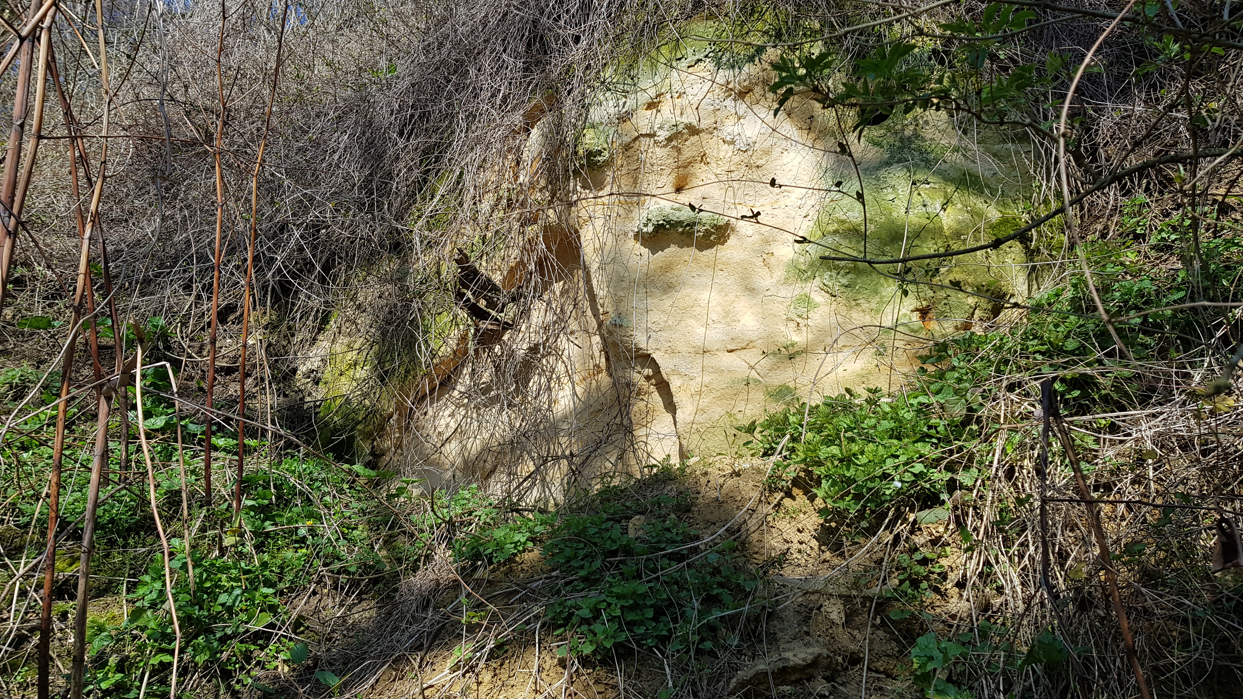 Groothofgroeve, Valkenburg aan de Geul, Nederland